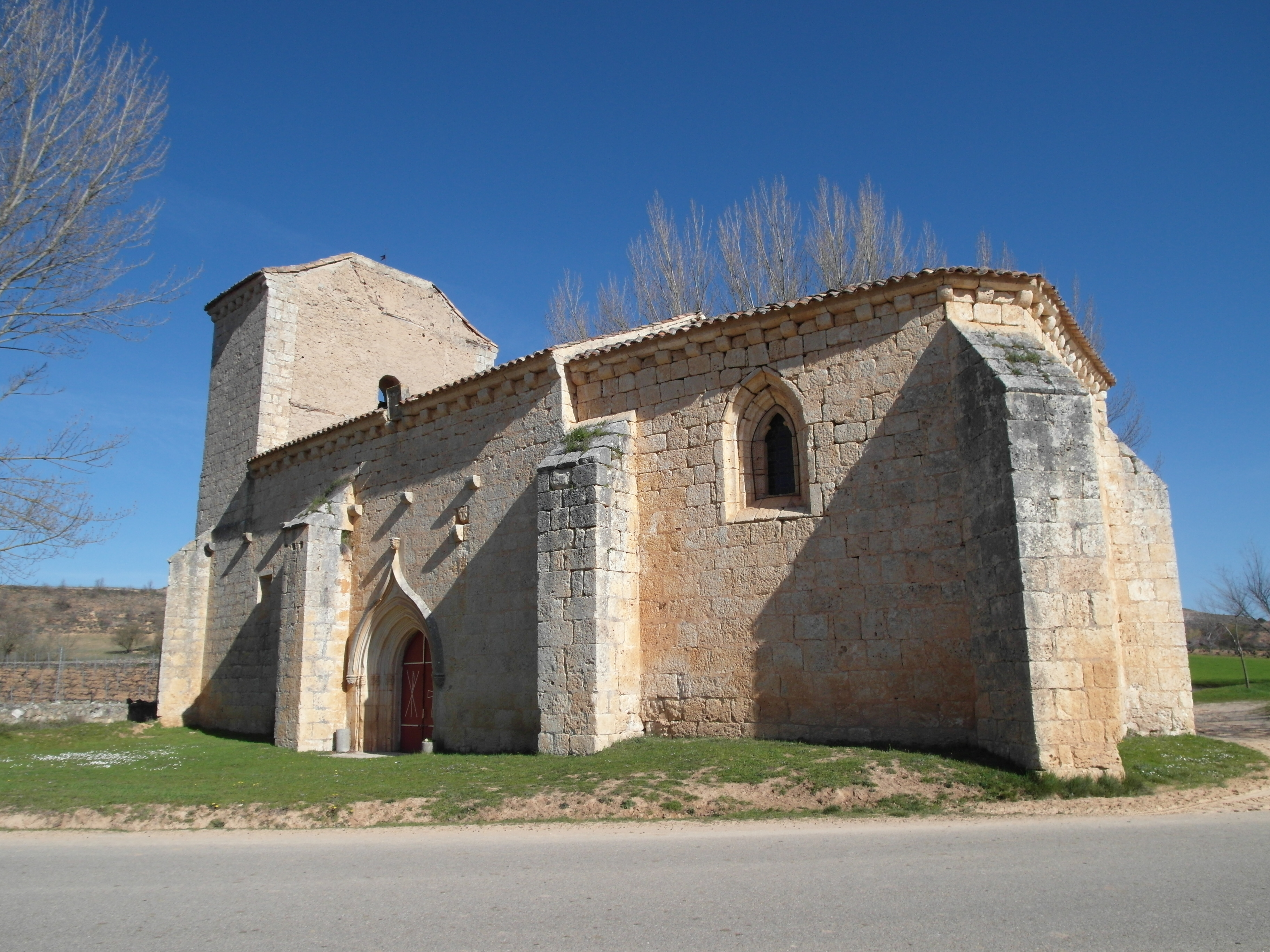 Ermita de San Juan o de Monzón, Gumiel del Mercado, Burgos.